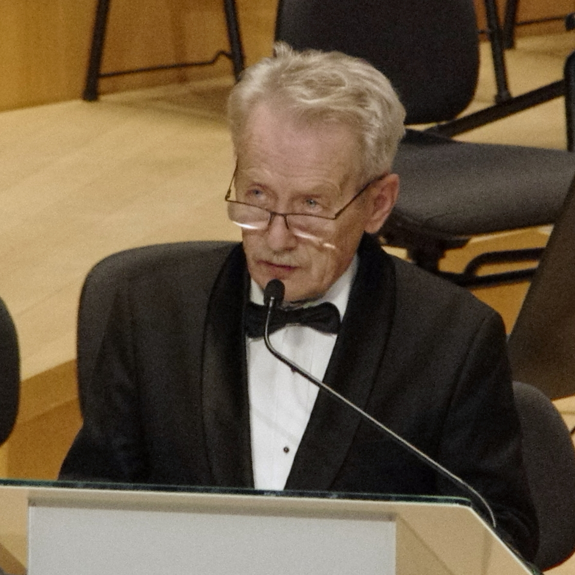 Tadeusz Deszkiewicz (1952– ) – polski dziennikarz, publicysta, producent filmowy, doradca społeczny prezydenta RP Andrzeja Dudy. Zdjęcie wykonano podczas wystąpienia w sali koncertowej w siedzibie NOSPR w Katowicach, poprzedzającego koncert z okazji 90-lecia Muzeum Śląskiego; Tadeusz Deszkiewicz podczas swojego wystąpienia odczytywał list od prezydenta RP Andrzeja Dudy.